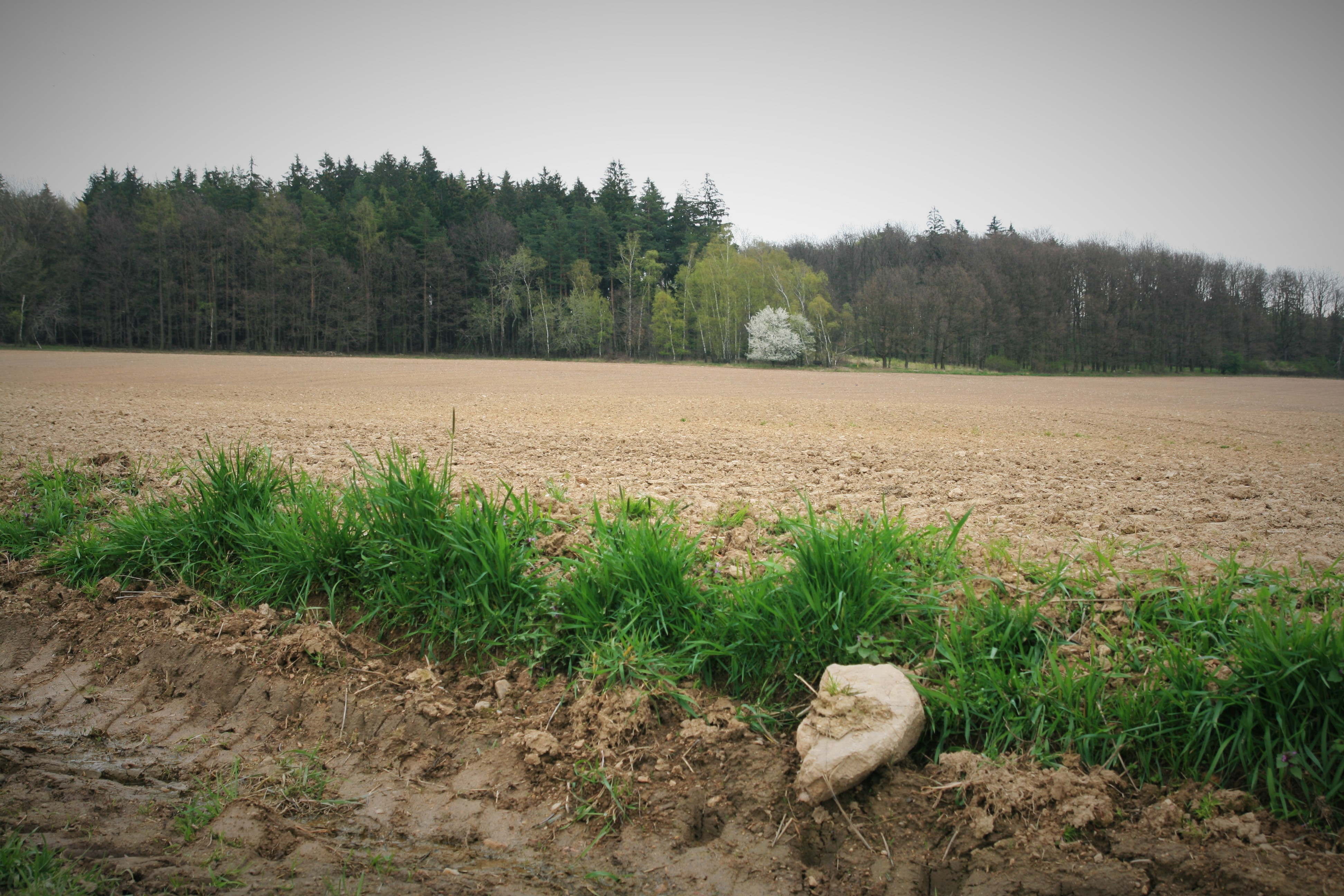 Obec Lomnice, okres Brno-venkov. Zorané pole na Dališkách, v pozadí přírodní památka Klášterce.